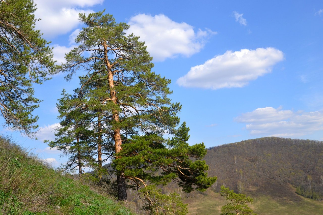 Шульган-Таш заповедник: Заповедник находится на западном макросклоне Южного Урала, водоразделе рр. Белая и Нугуш (скальный массив Шульган-Таш). Местонахождение заповедника определяется координатами: 52°90 ’ - 53°10’ с.ш. и 57°00’ - 57°15’ в.д,Бурзянский район, Башкортостан This image is related to the protected area of Russia number 0200105